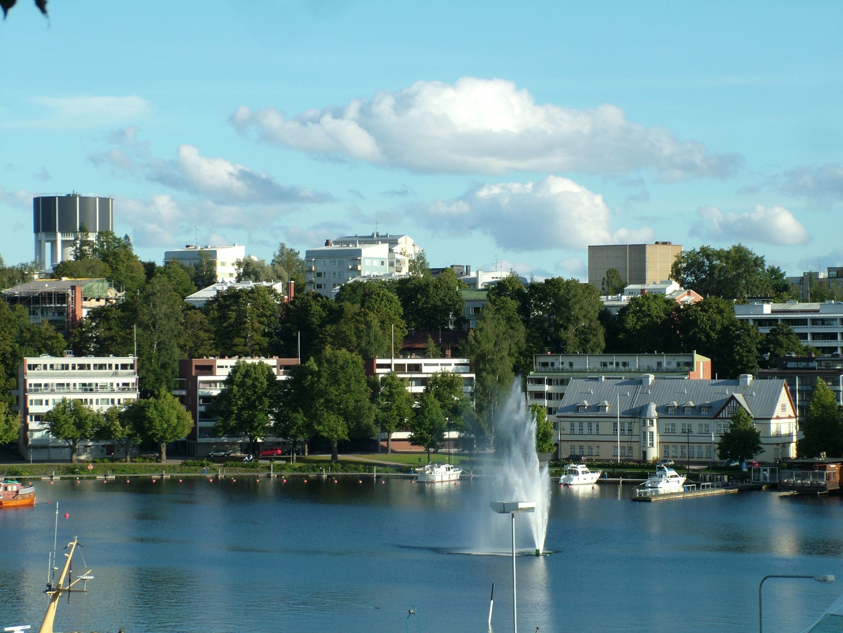 Lappeenranta, Finnland, der See und die Stadt von der Festung aus